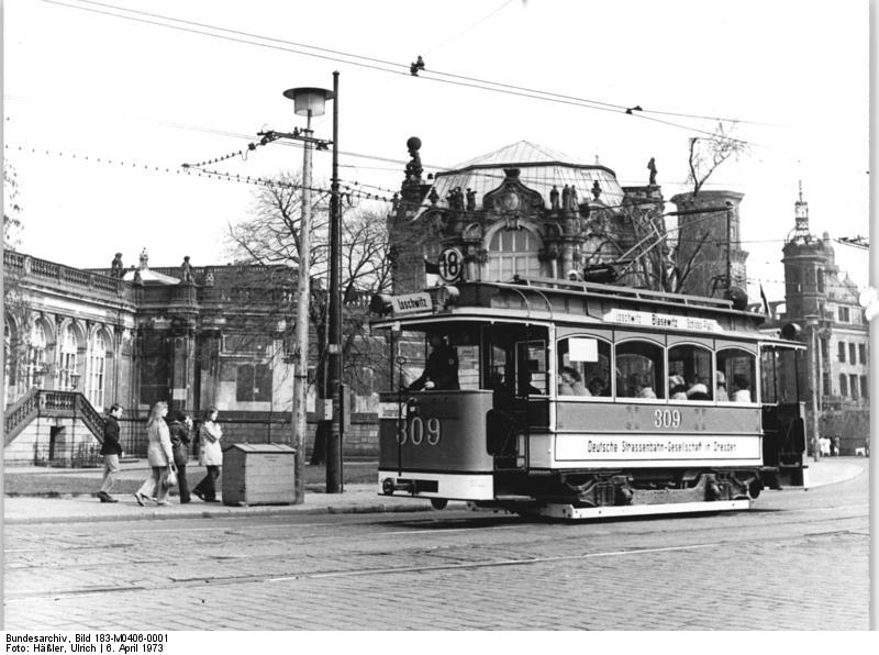 Dresden, Historische Straßenbahn ADN-ZB Häßler 6.4.1973 Dresden: Oldtimer Straßenbahn- Ein Oldtimer unter den Straßenbahnen ist seit Frühjahrsbeginn wieder in der Elbestadt zu sehen. In- und ausländische Gäste nutzen die Gelegenheit, mit diesem Fahrzeug eine Stadtrundfahrt zu unternehmen. Die Straßenbahn fuhr Anfang des Jahrhunderts im Dresdner Liniendienst und wurde von einer Arbeitsgruppe der Verkehrsbetriebe der Stadt wieder aufgemöbelt.